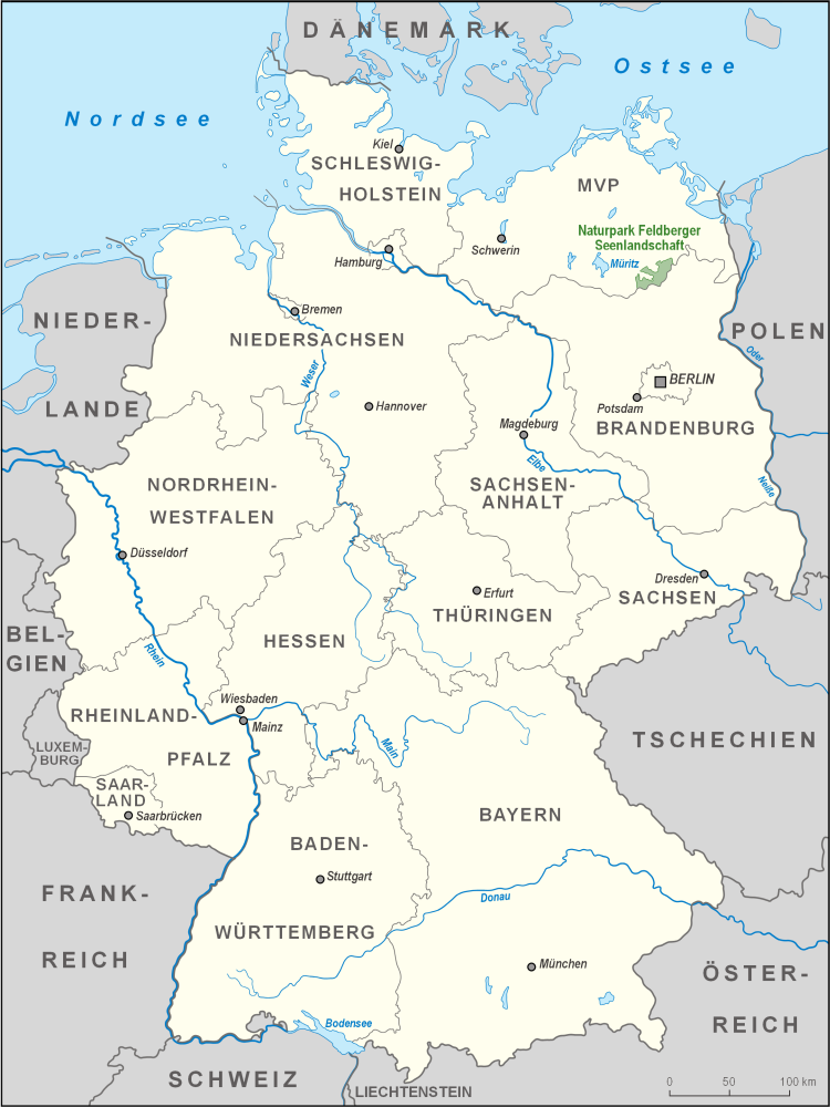 Karte des Naturparks Feldberger Seenlandschaft in Deutschland